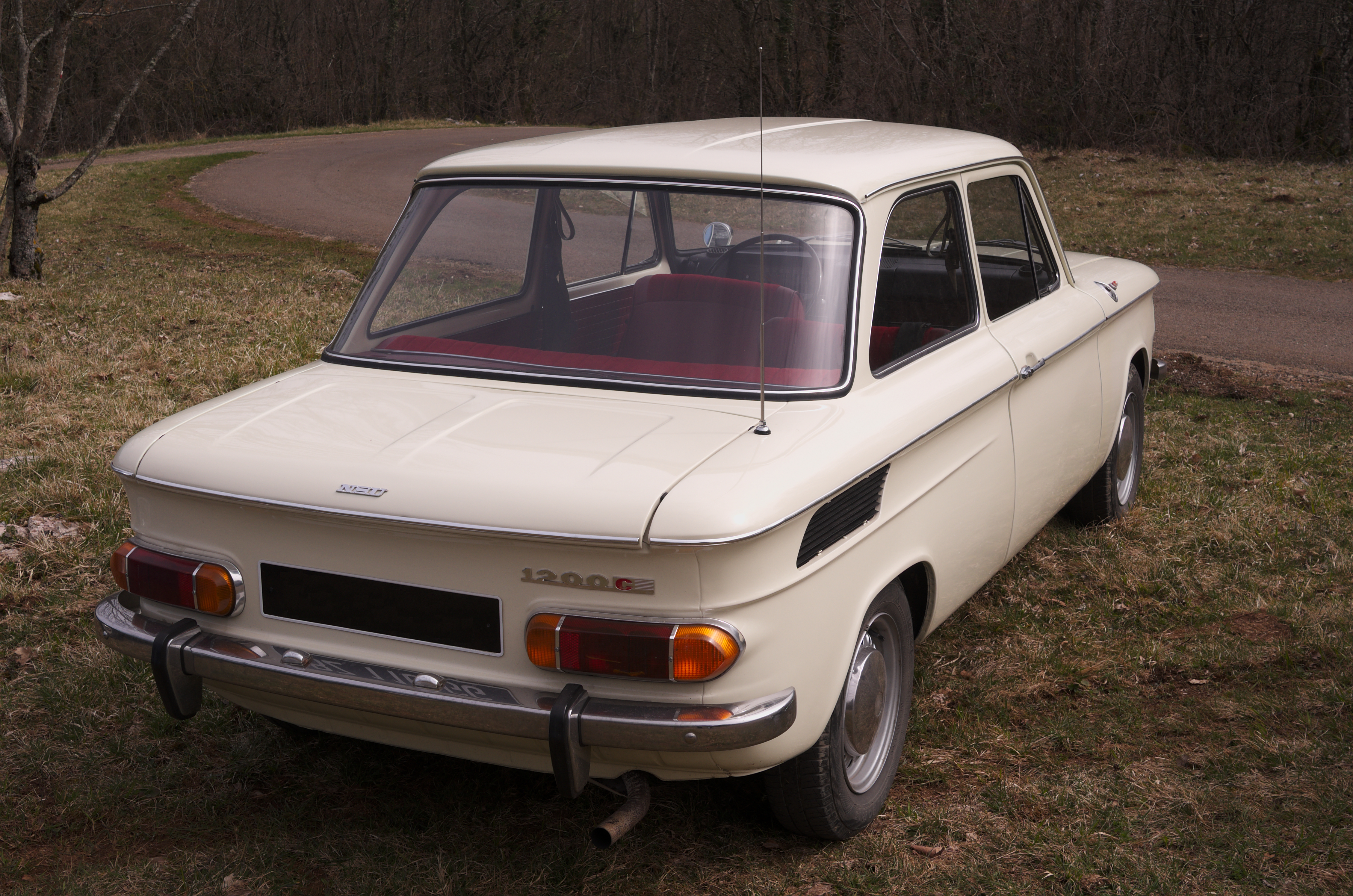 Sortie Soupapes dégrippées 07-04-2013 - NSU 1200